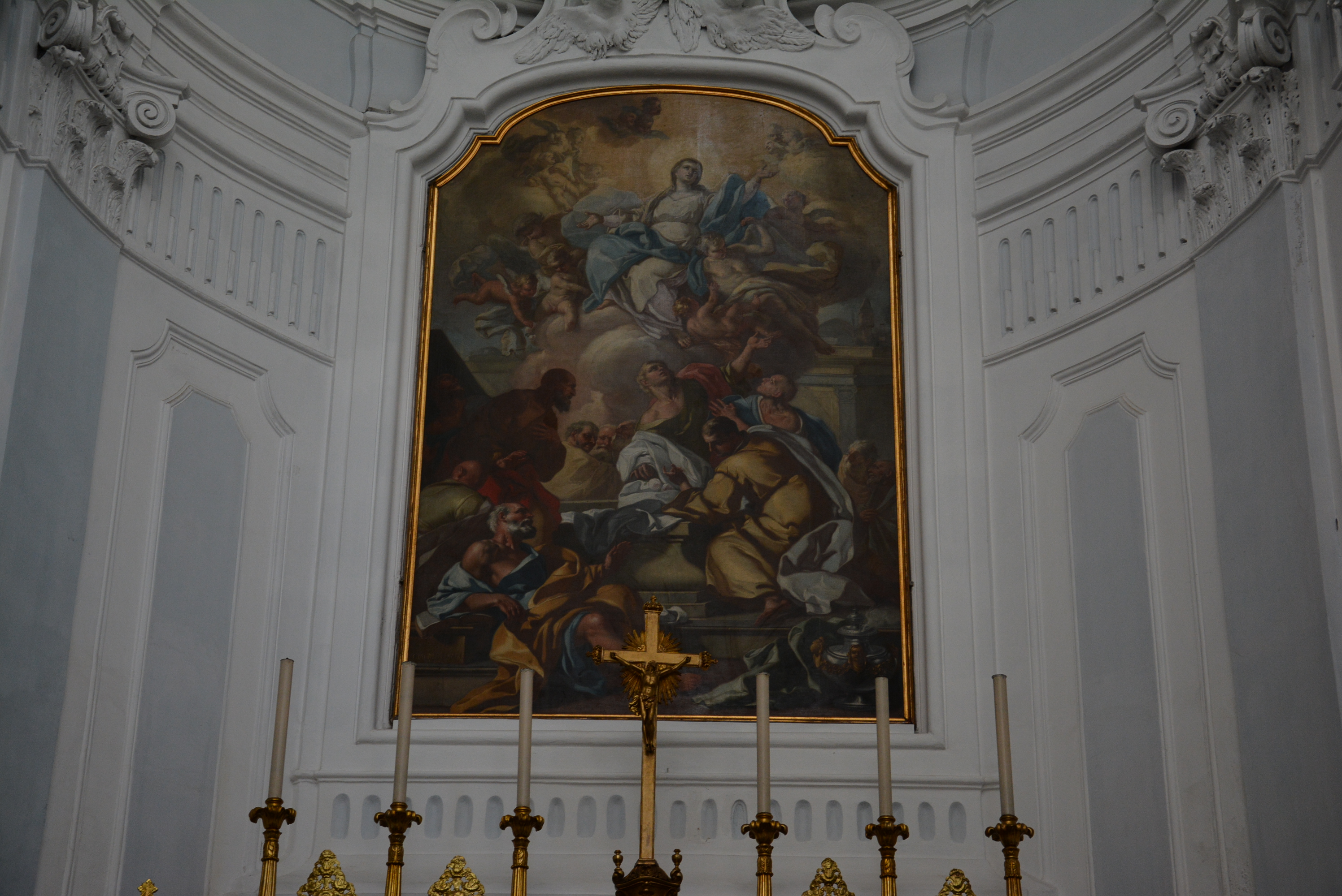 Cattedrale di Santa Maria Assunta a Ischia